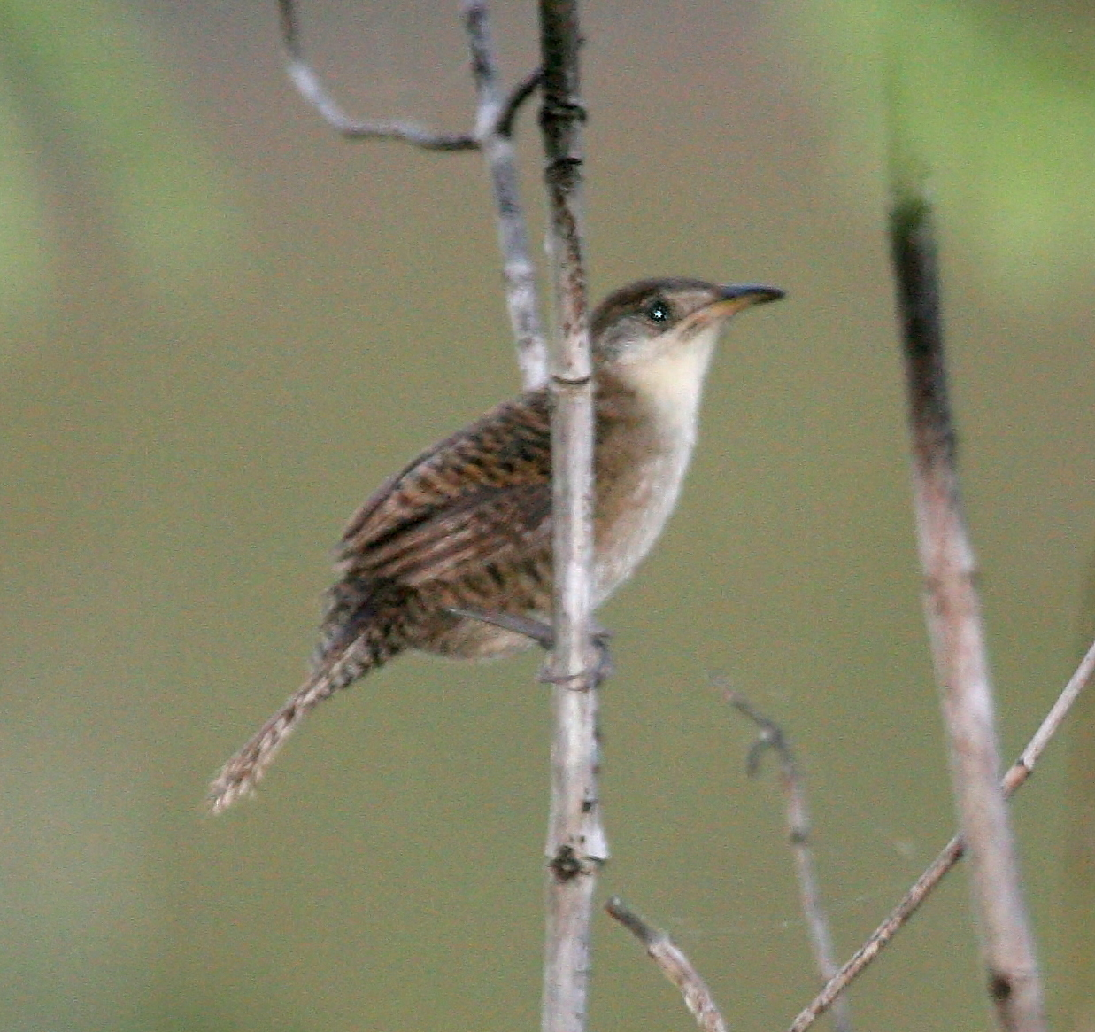 Zapata Wren Ferminia cerverai